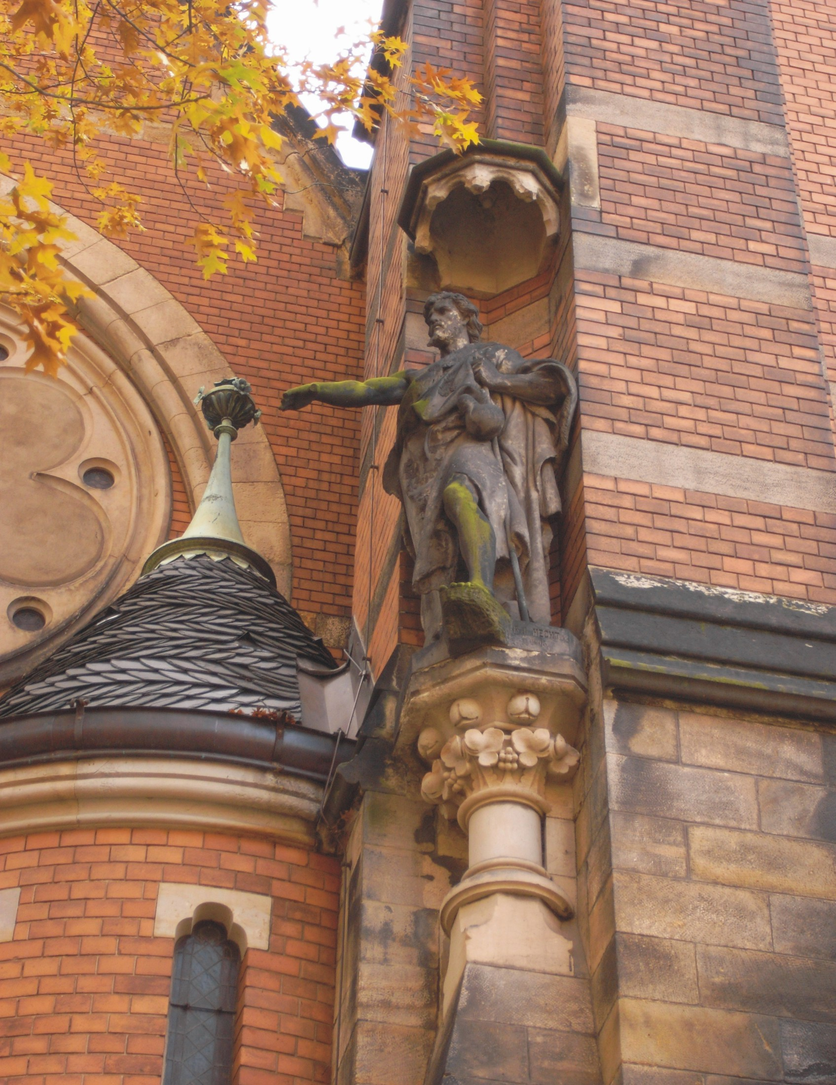 Heilig-Geist-Kirche in Dresden, Fassadendetail mit Figur von Friedrich Hecht (Sachsen, Deutschland)